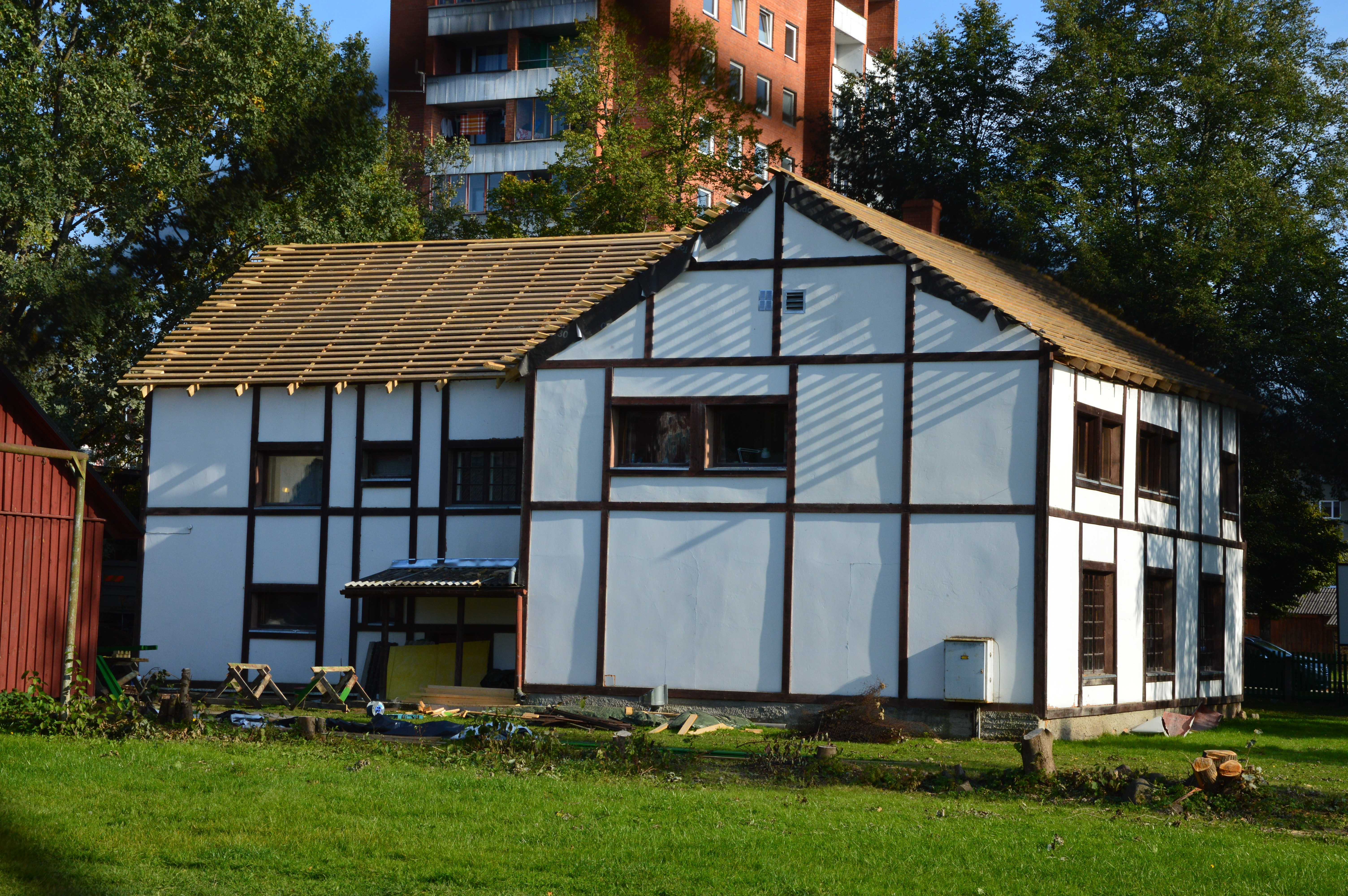 Võru Instituudi hoone. Uue katuse paigaldamine.